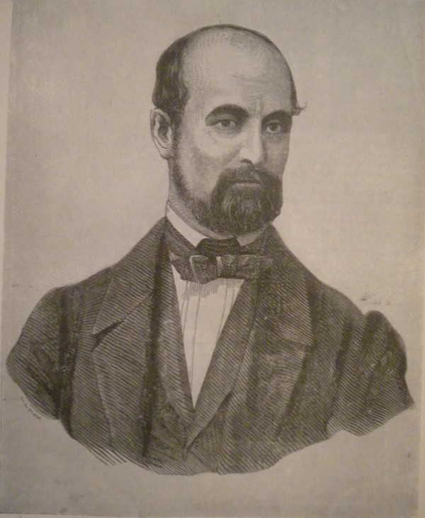 Uomo politico italiano, ministro del Regno di Sardegna, primo ministro del Regno d'Italia, ministro dell'interno dello stesso.